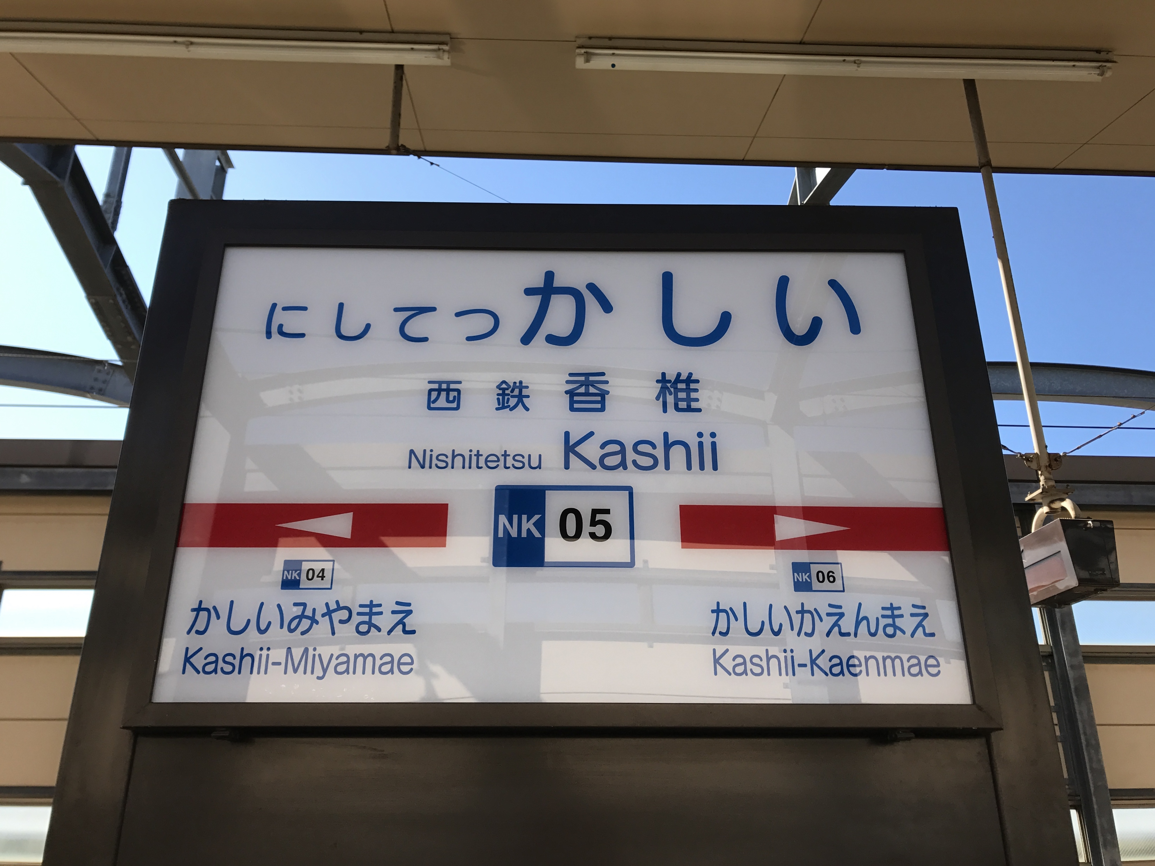 西鉄香椎駅の駅名標